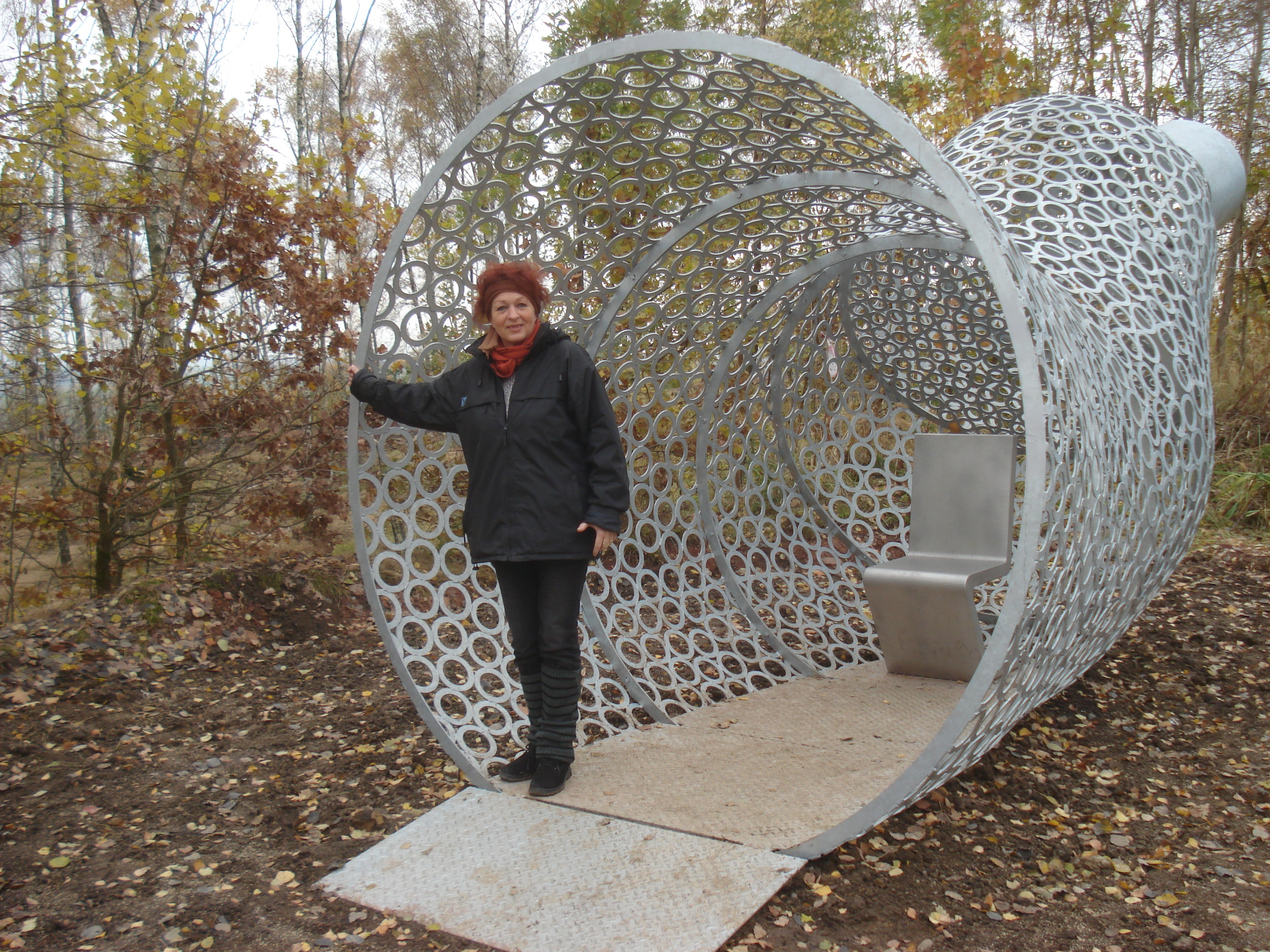 Die Skulptur steht auf der Deutschlandschachthalde im so genannten „Energiegarten“. Die Skulptur wurde von Erika Harbort gestaltet und in Zusammenarbeit mit der WHZ Zwickau technisch realisiert. Der im Wunderhorn eingebaute Stuhl wird über eine Sonde durch die Restwärme im Abraum der Halde vom Kohlebergbau erwärmt und hat immer etwa 35 Grad Celsius Temperatur.Depicted person: Erika Harbort – German sculptor and painter